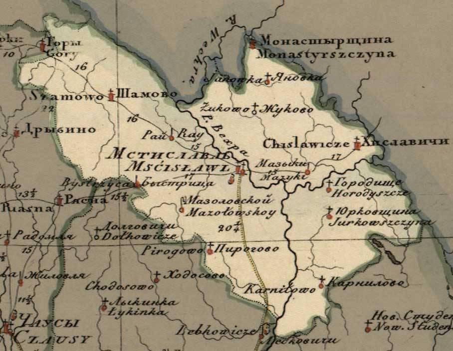 Карта Ходосы